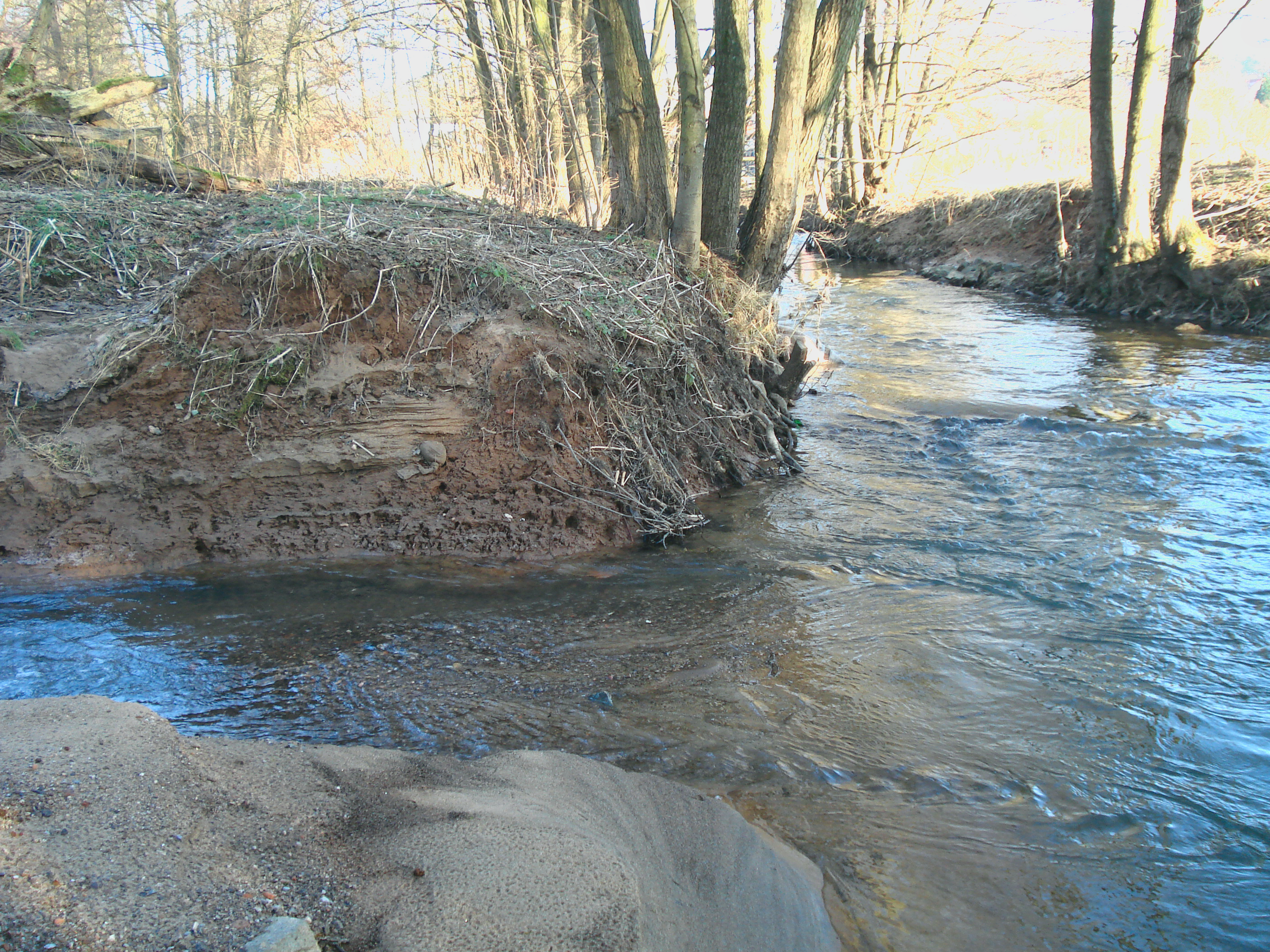 Die Mündung des Krombaches (links) in die Kahl